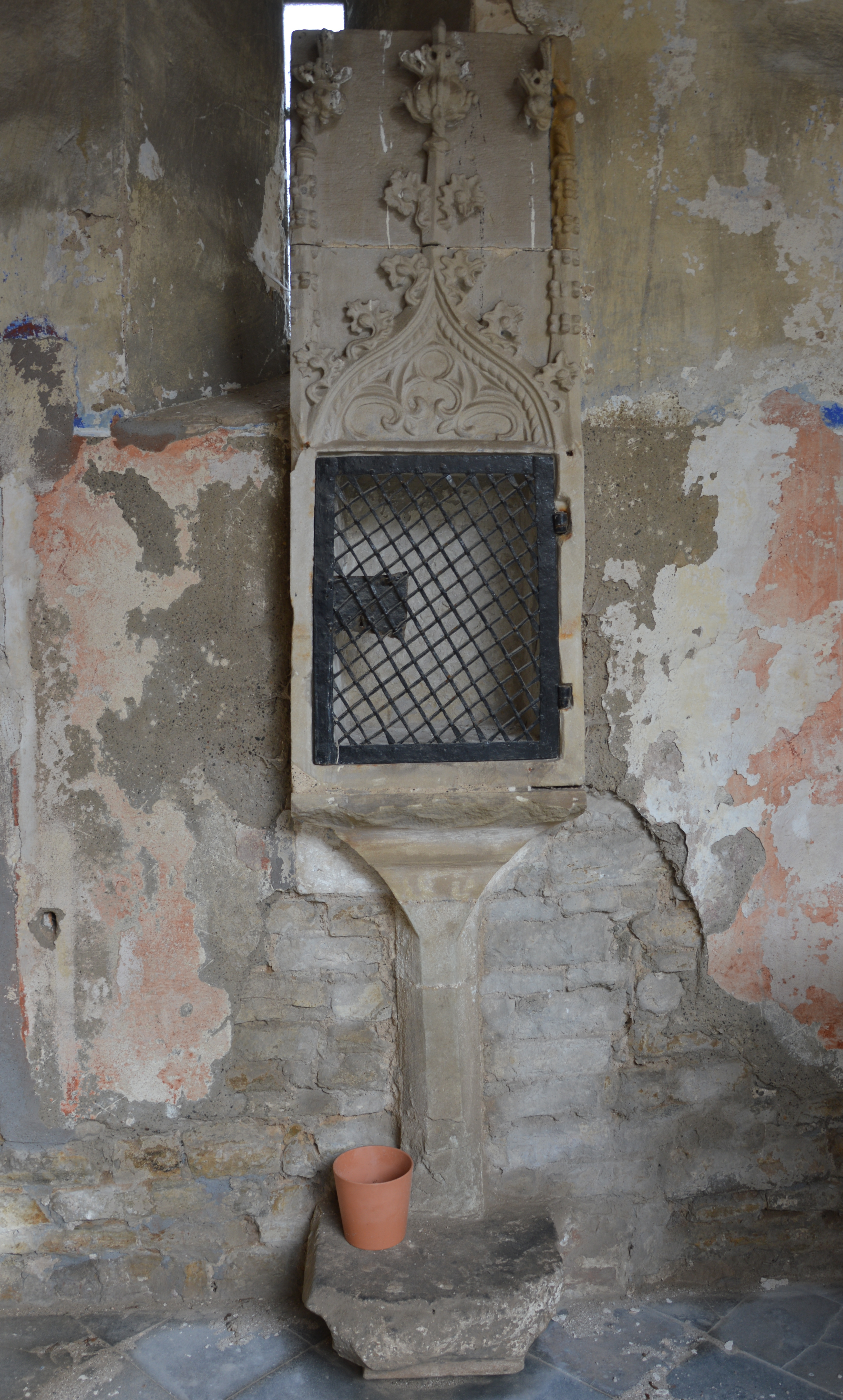 Kirche Rössen